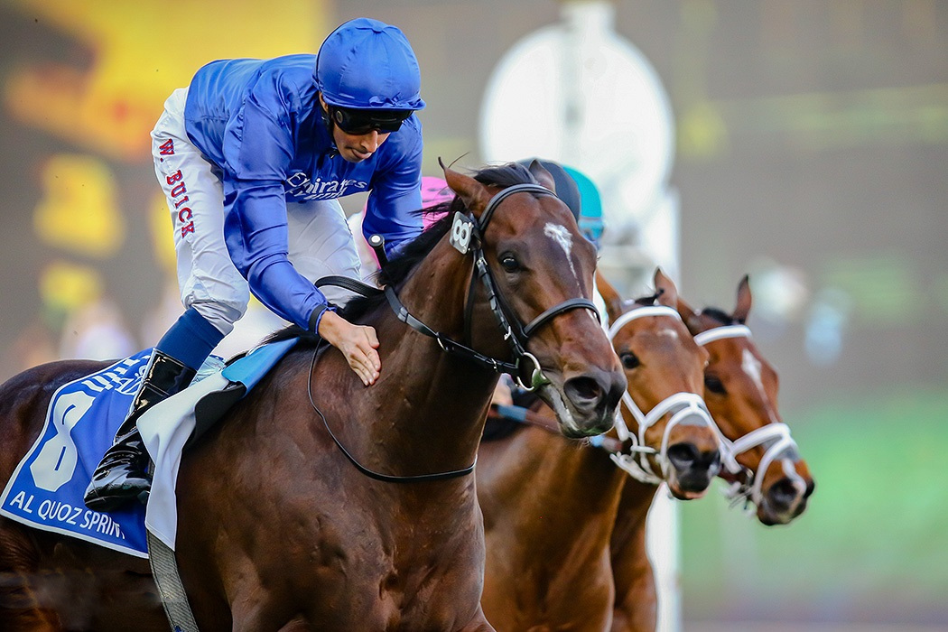 جام جهانی اسب‌دوانی ۲۰۱۹ - دبی